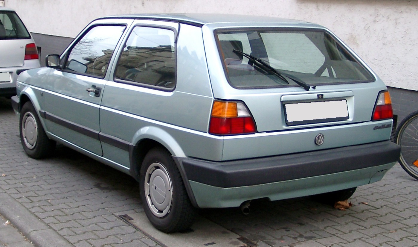 VW Golf II Facelift